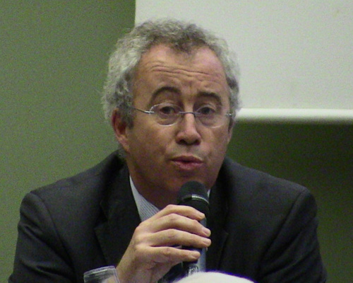 Luc Oursel, Président du Directoire d'AREVA et de la Fondation Georges BESSE, intervient à un colloque relatif à l'oeuvre de Georges Besse, le 14 novembre 2011, dans le grand amphi de MINES ParisTech